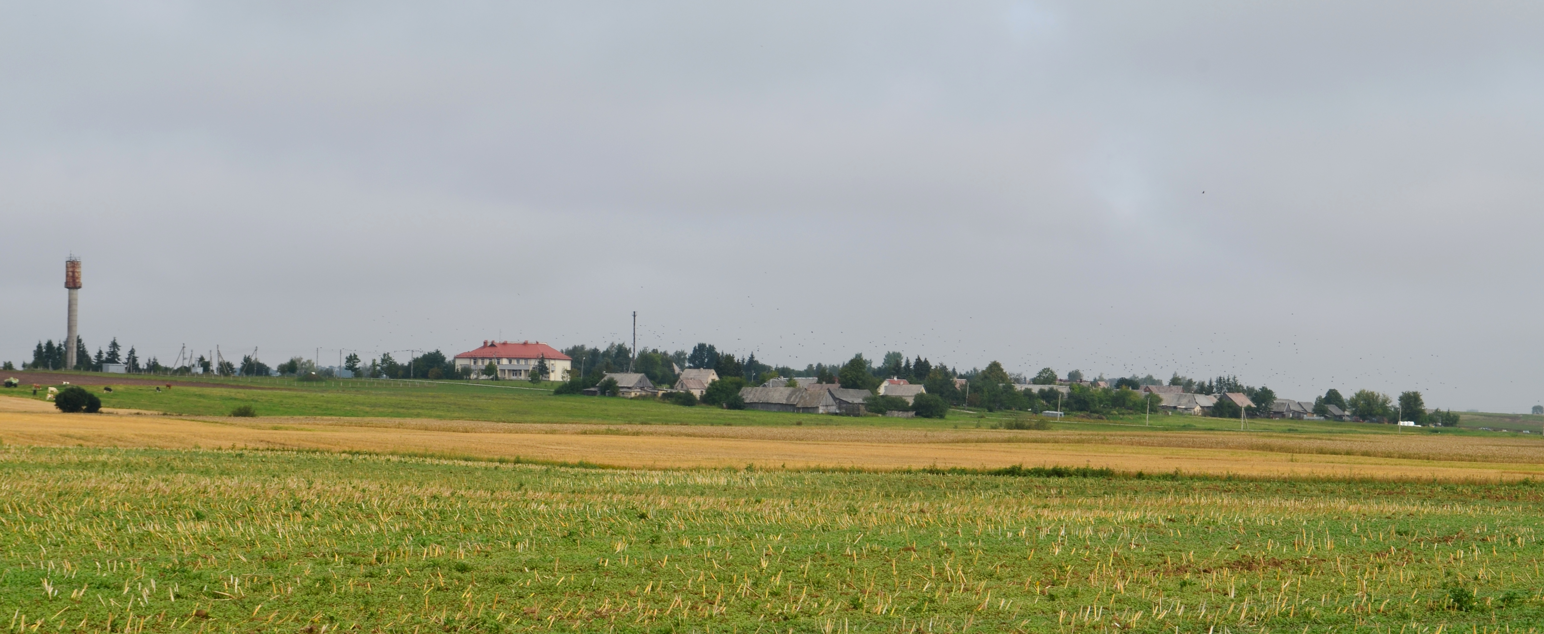 Liučiūnai iš pietryčių, Kauno raj.